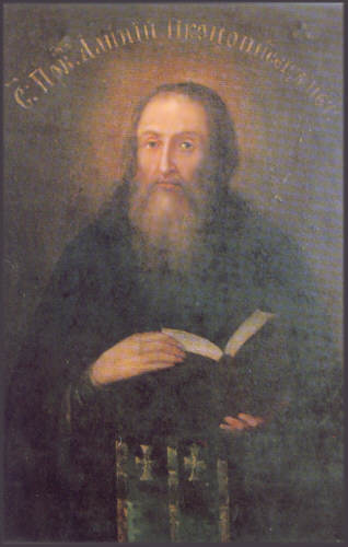 Алипий (Алимпий) Печерский, иконописец Икона над ракой с мощами. Киево-Печерская лавра.